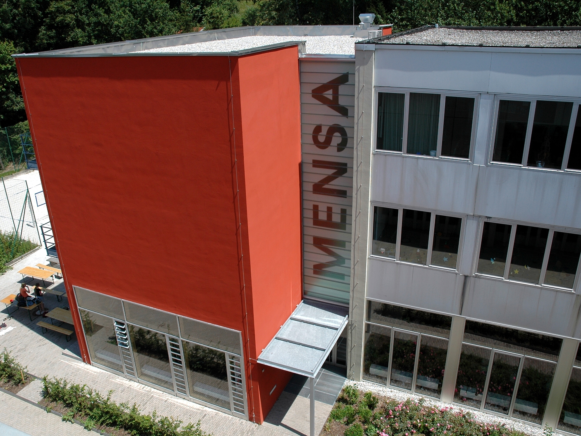 Luitpold-Gymnasium Wasserburg am Inn - Bayern - Deutschland